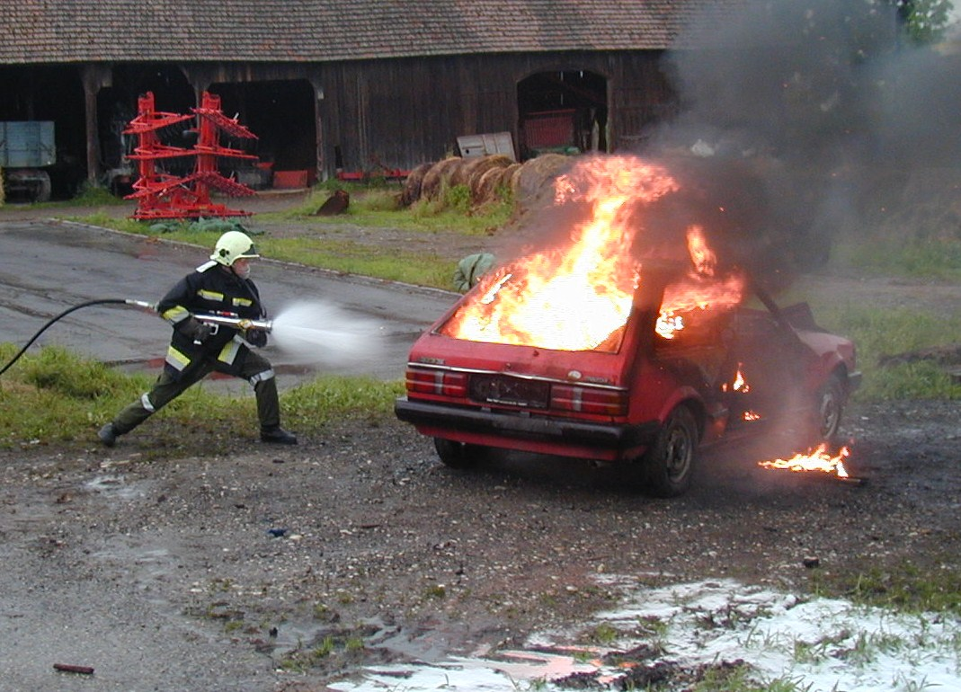 Bekämpfung eines KFZ-Brandes mittels IFEX, Feuerwehr Nettingsdorf